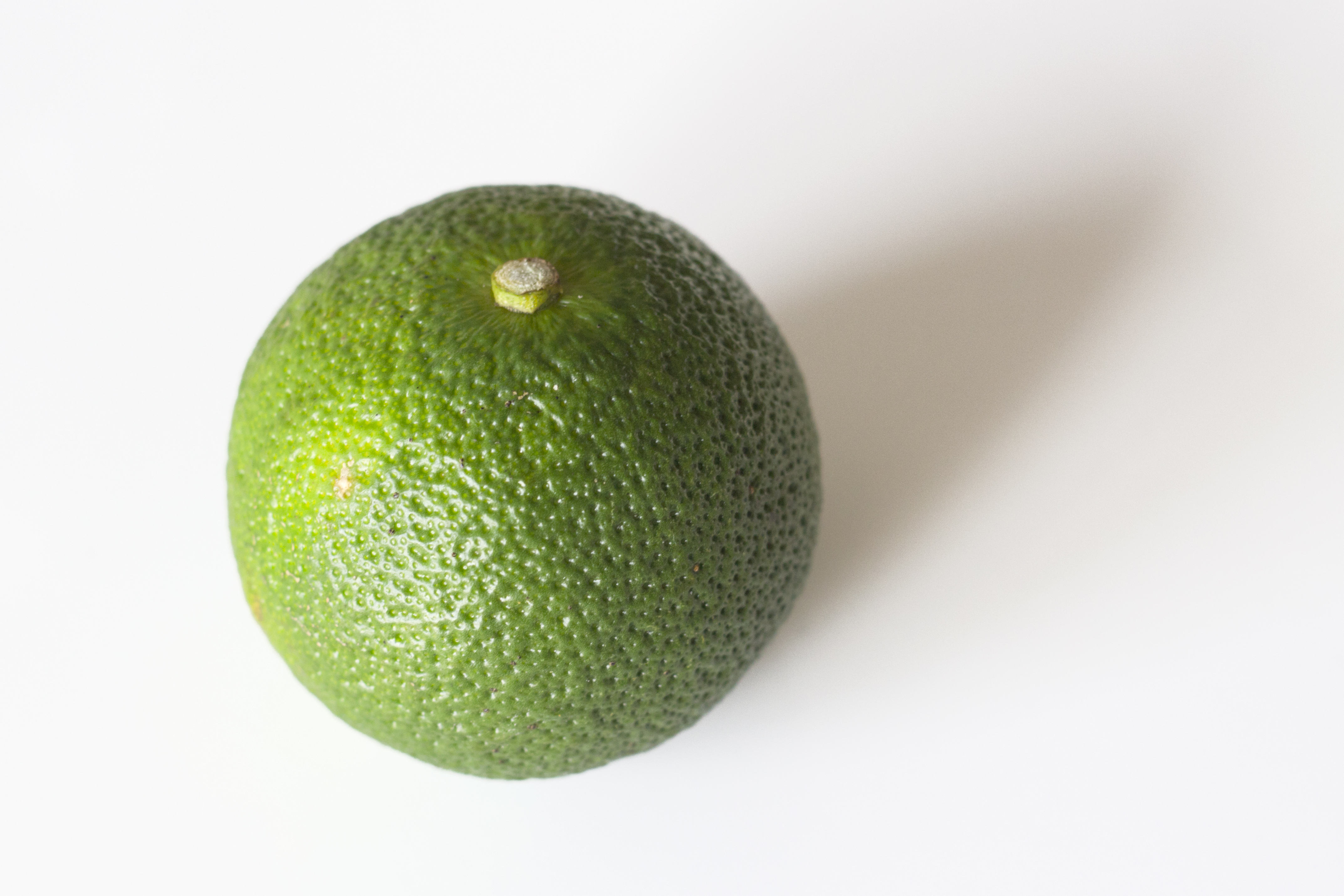 Hebezu citrus fruit from Hyuga, Miyazaki